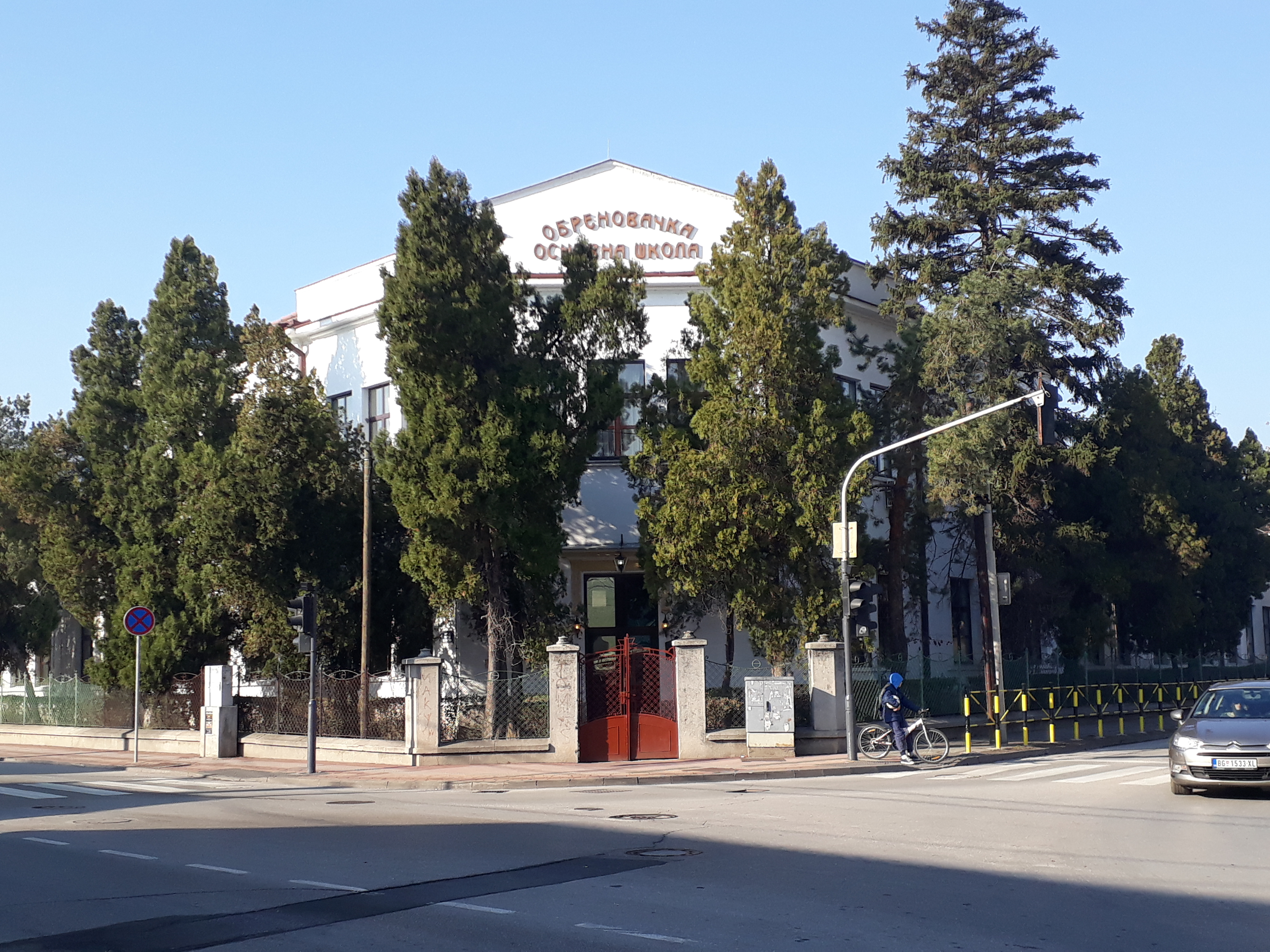 Prva osnovna škola u Obrenovcu